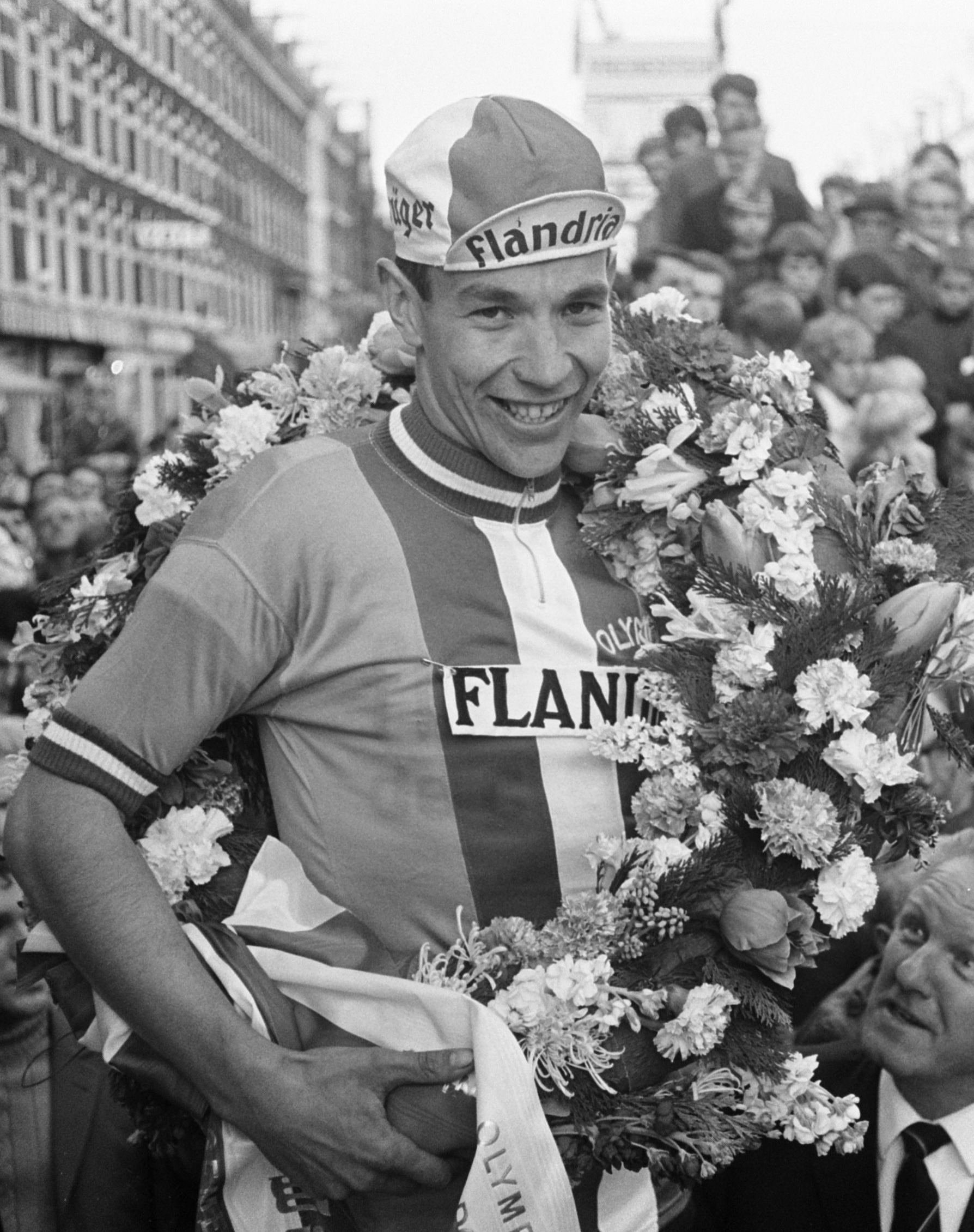 Olympias Toer, winnaar Peter Legierse wordt gehuldigd in Amsterdam Surindenstraat